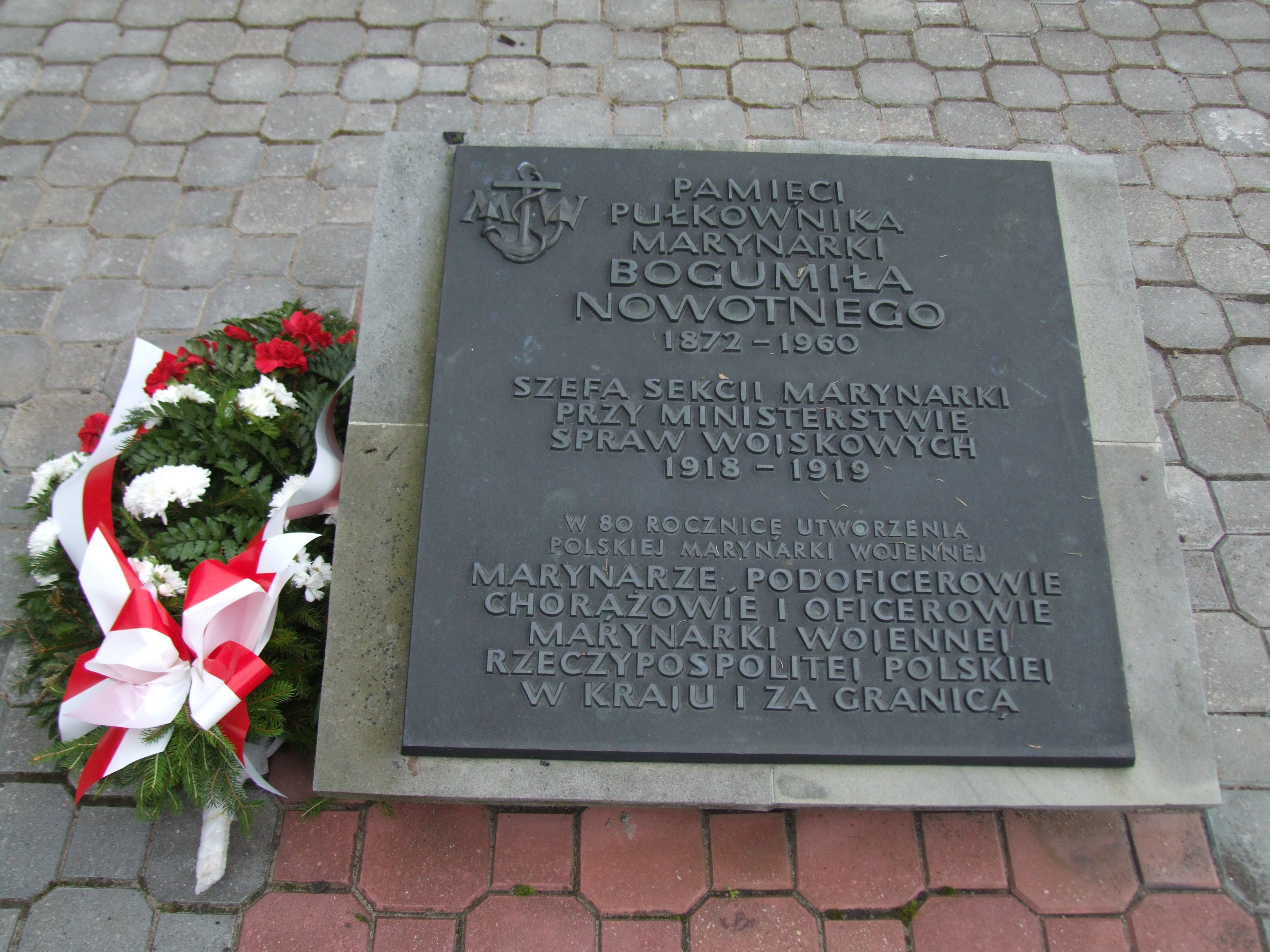 Gdynia-Oksywie Cmentarz Marynarki Wojennej